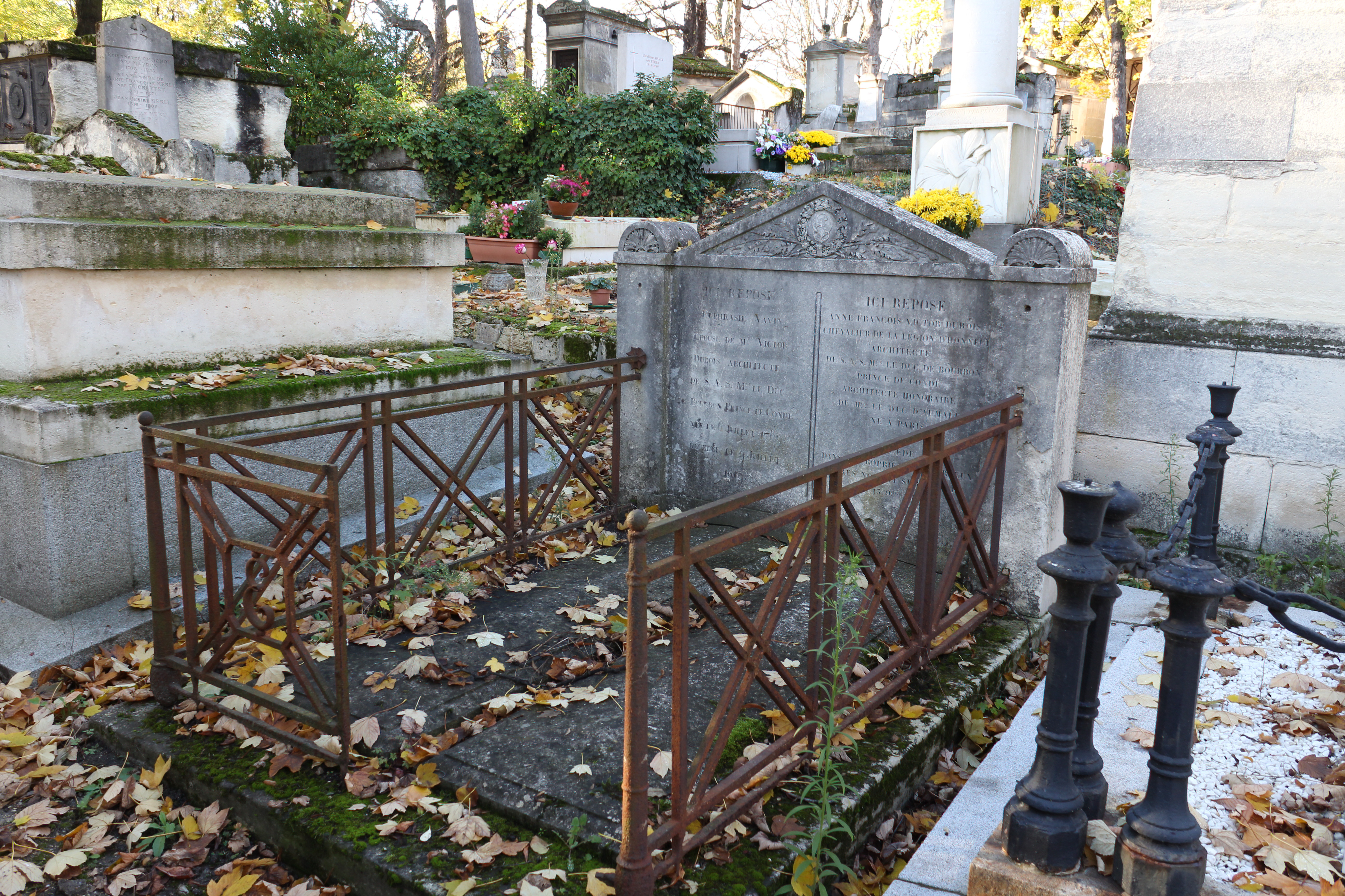 Vue d'ensemble